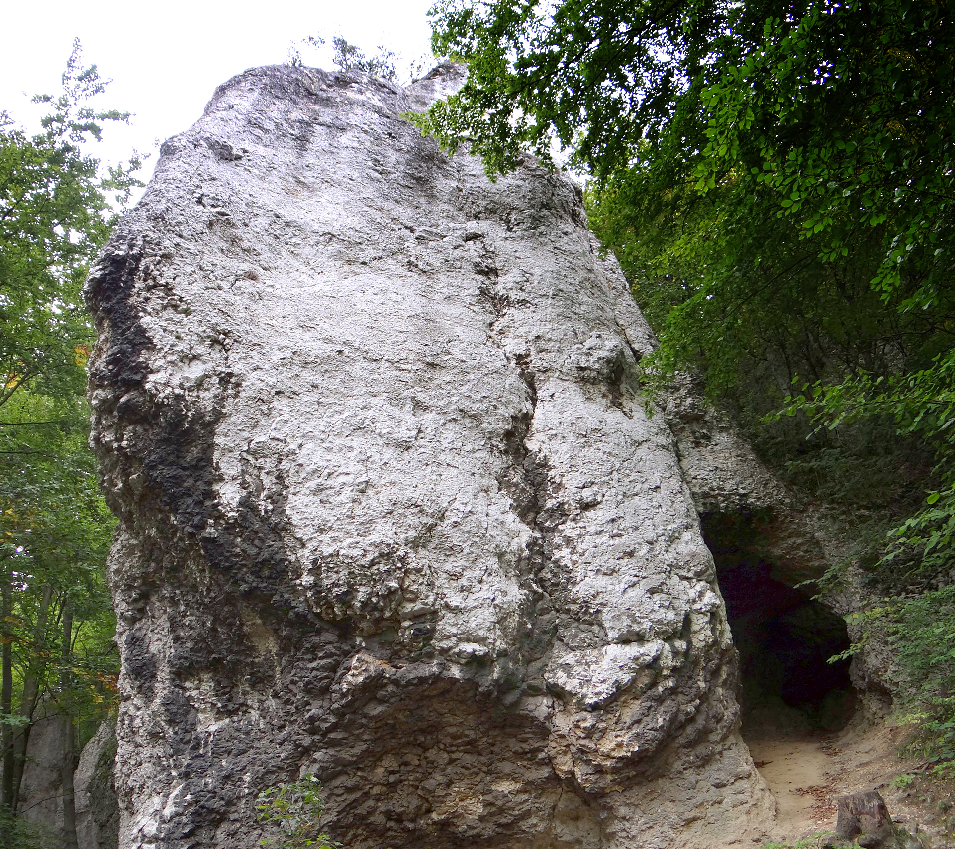 Dolna skała Czarcich Wrót